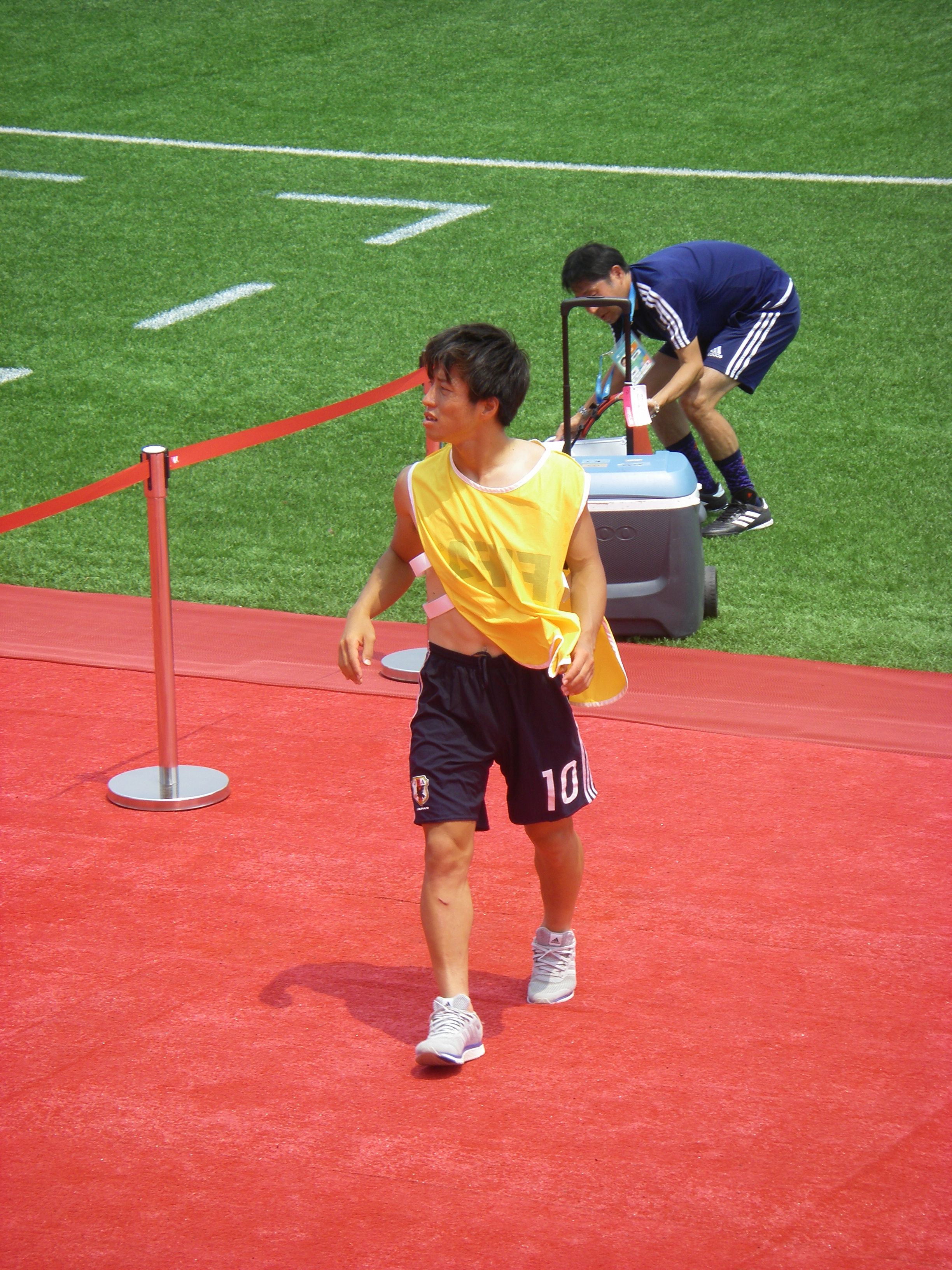 中文（台灣）: 來台灣參加2017年夏季世界大學運動會足球比賽的日本足球運動員松田天馬